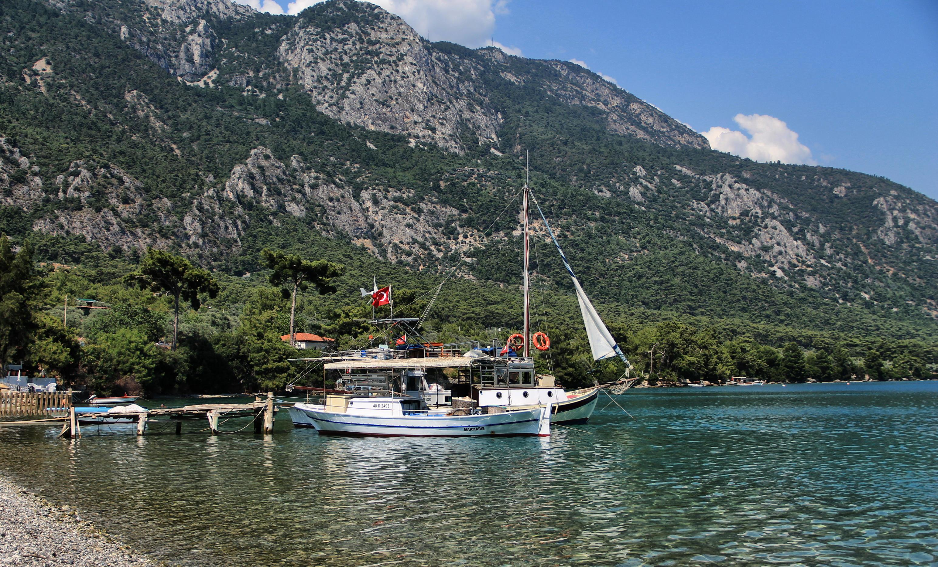 Unnamed Road, 48220 Kultak/Milas/Muğla, Turkey